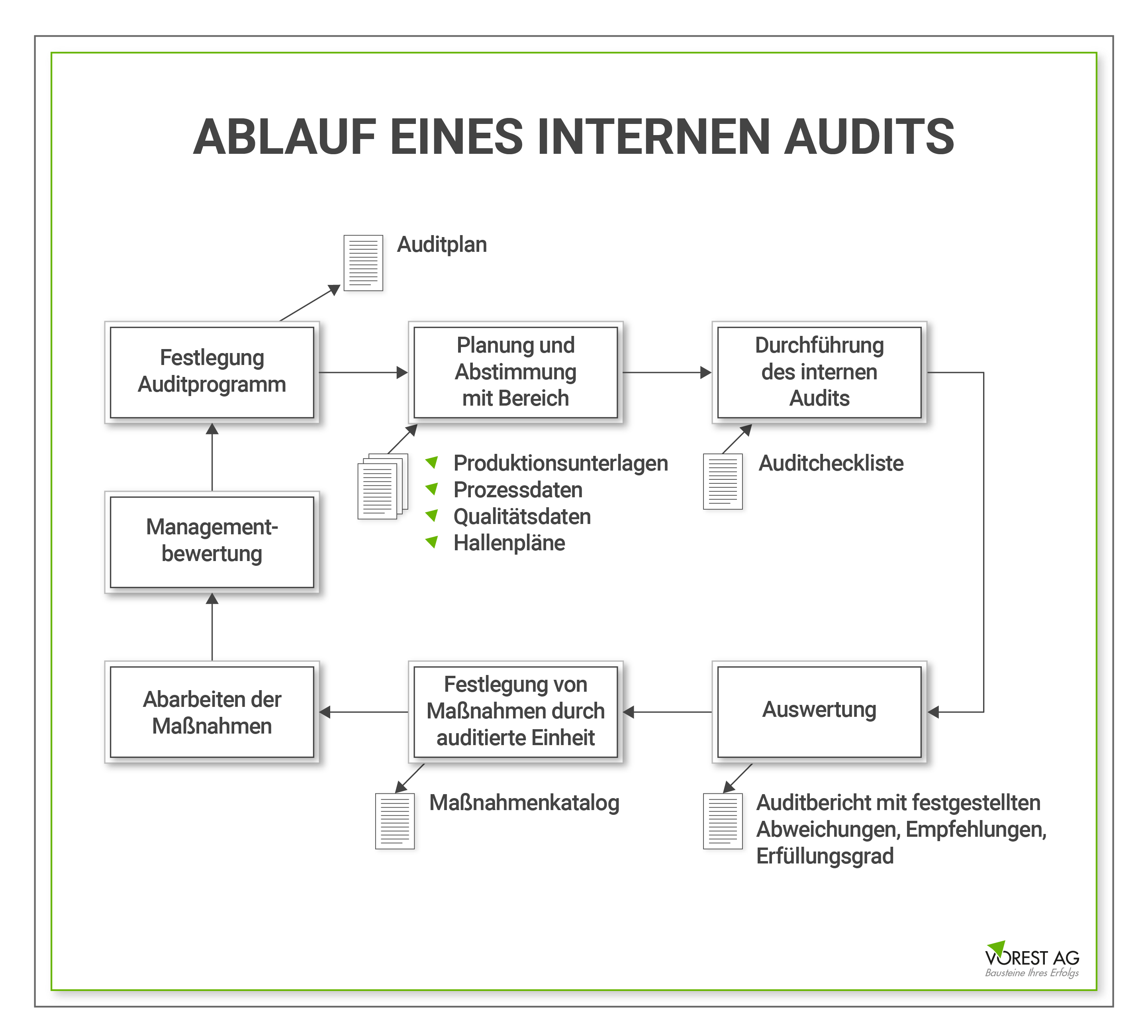 Sie sehen hier den Ablauf eines internen Audits mit den einzelnen Schritten. Dabei sehen Sie außerdem, welche Dokumente zu welchem Zeitpunkt benötigt bzw. erstellt werden.